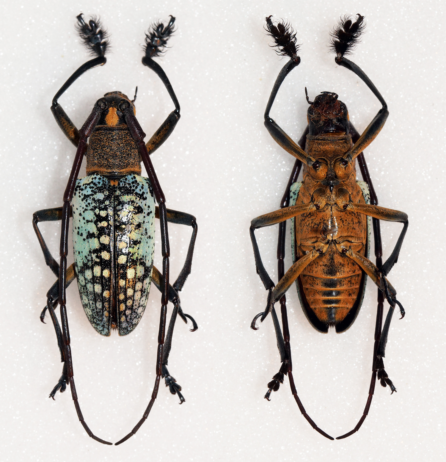 Sex: Male Data: 04-11-08 - Ranau - Sabah - Malaysia Size: 24mm